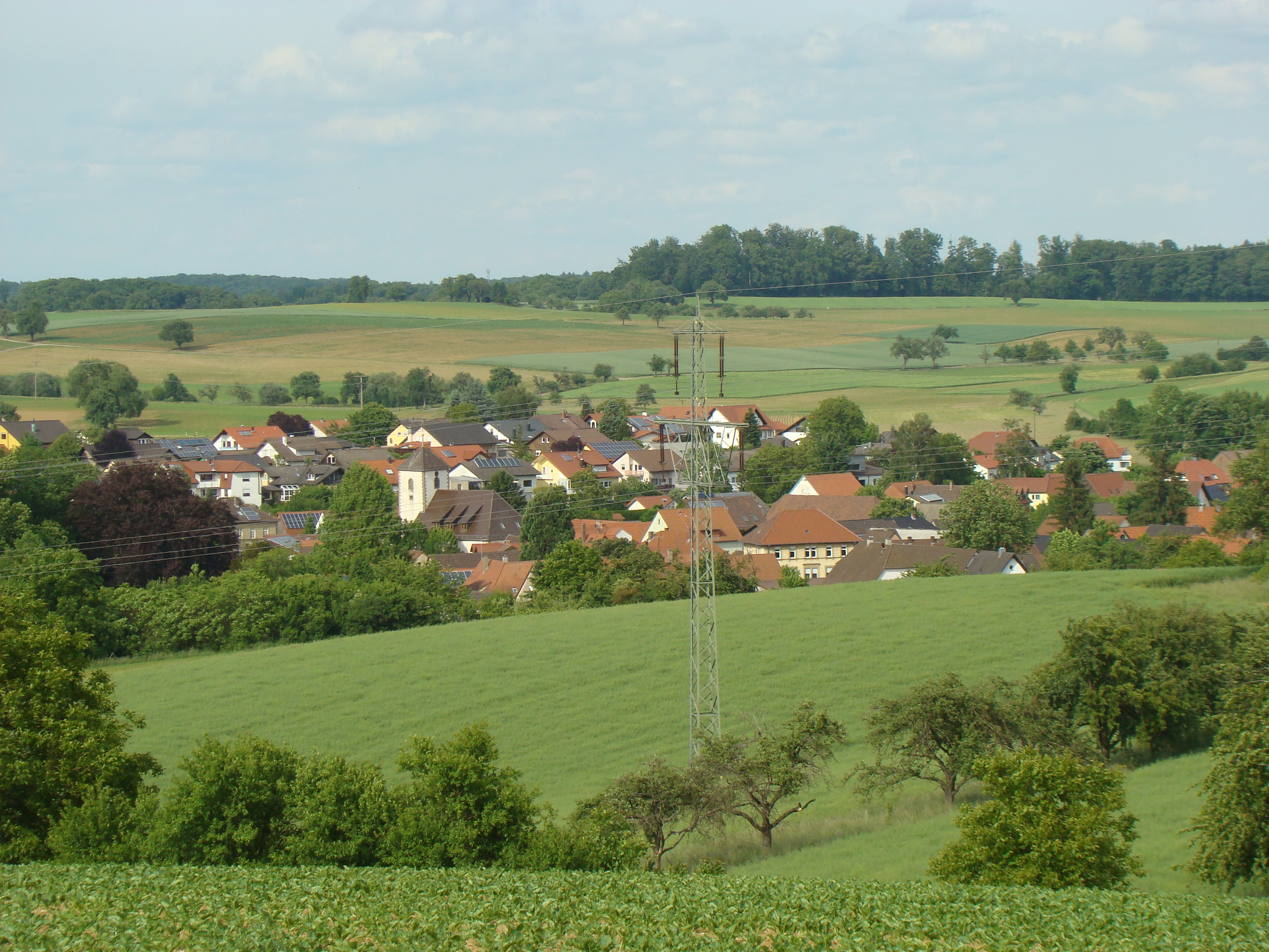 Ehrstädt